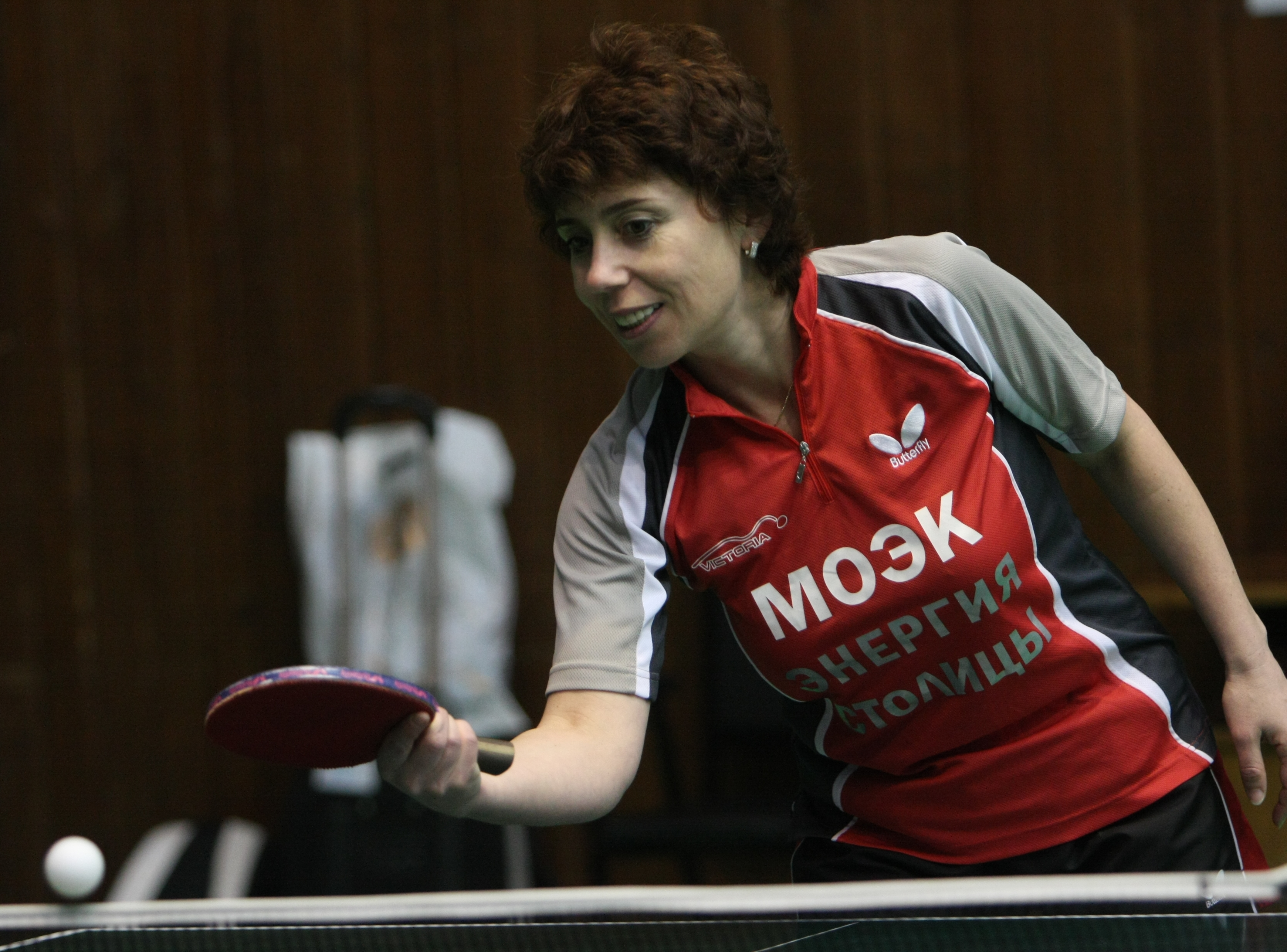 Ирина Палина во время клубных соревнований в Москве, 4 мая 2011 года.